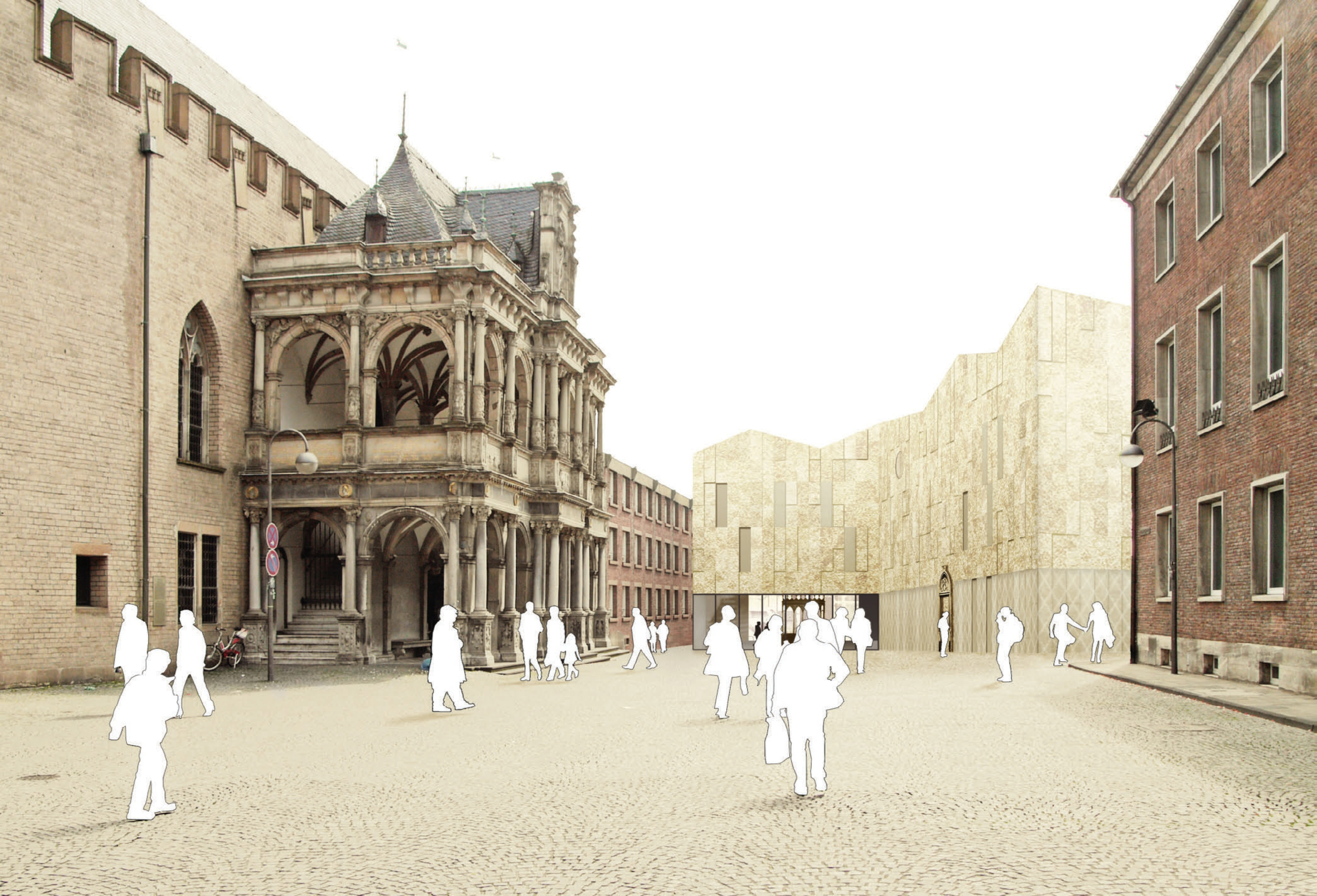 Bauplanung Archäologische Zone Jüdisches Museum Köln